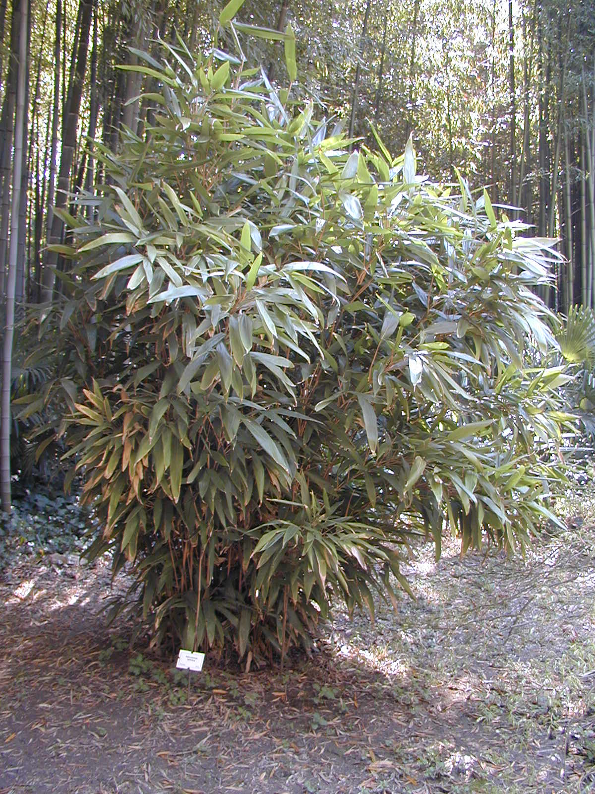 Indocalamus latifolius à la Bambouseraie de Prafrance à Anduze (Gard).